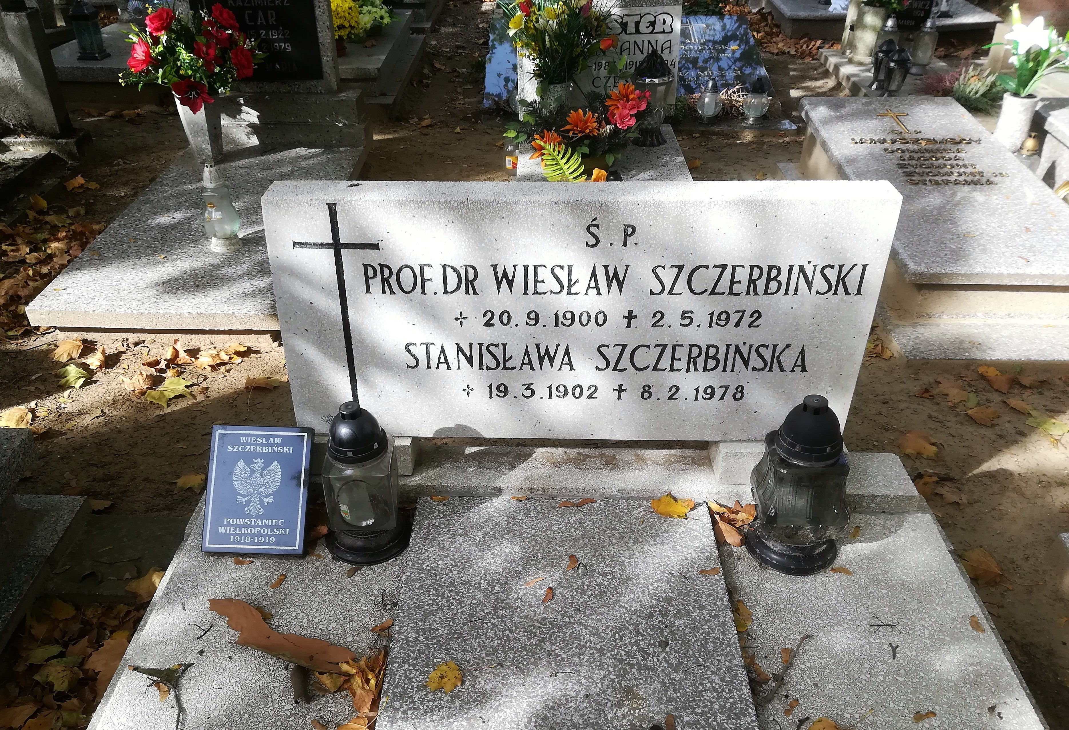 Cm. górczyński - grób prof. Wiesława Szczerbińskiego.